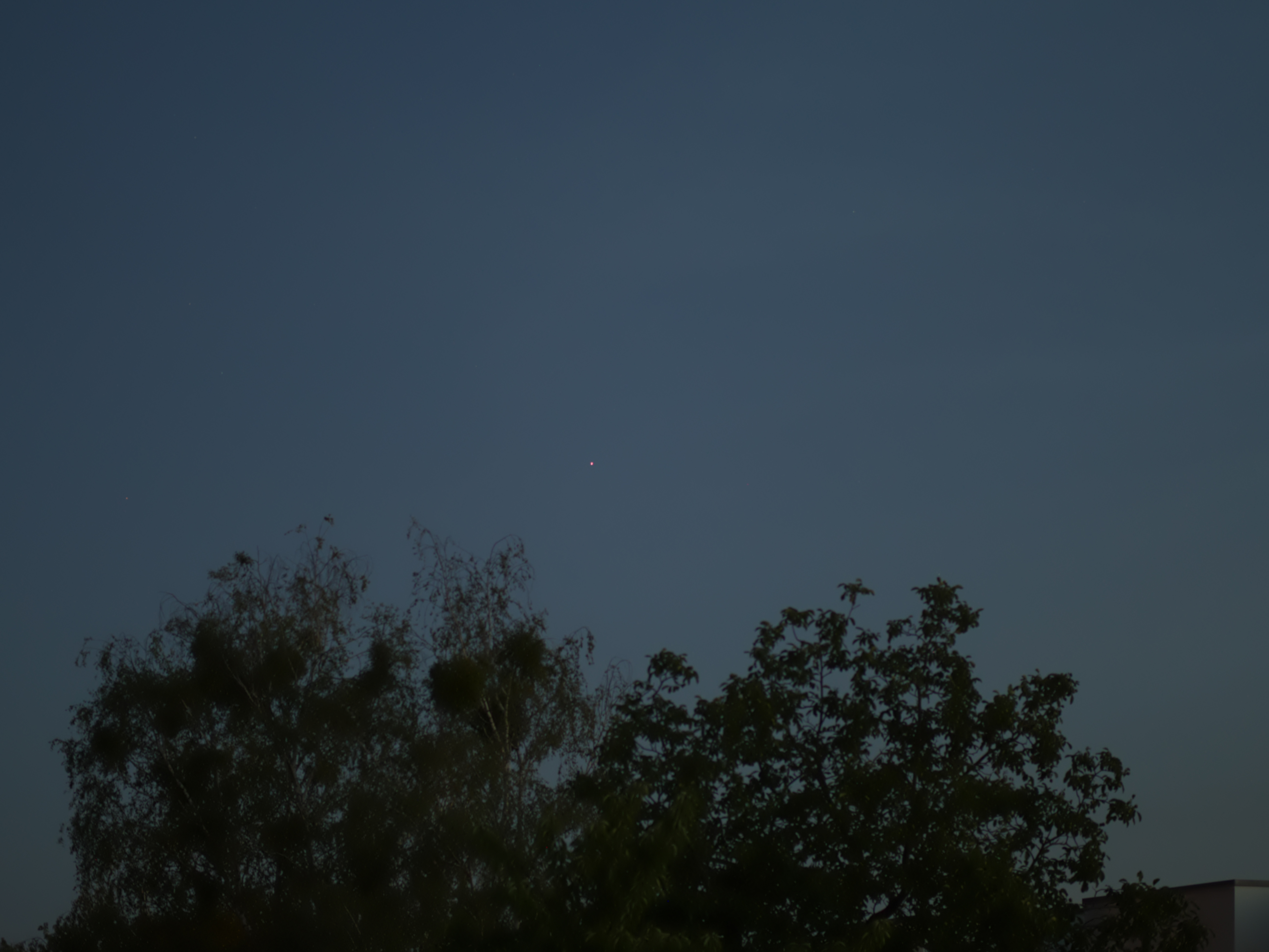 Der Rote Riese Arktur (Bildmitte) Ende Juni kurz vor dem Untergang im Nordwesten und kurz vor Beginn der morgendlichen bürgerlichen Dämmerung in Berlin